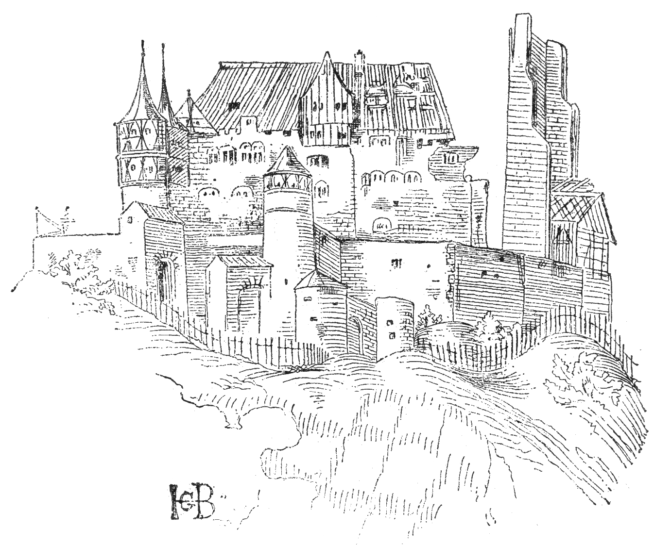 Burg Weinsberg 1515, mit Silberstift gezeichnet von Hans Baldung Grien. Original heute im Kupferstichkabinett der Kunsthalle Karlsruhe. Spätere Nachzeichnung. Original: Burg Weibertreu von Hans Baldung Grien 1515 Original.jpg